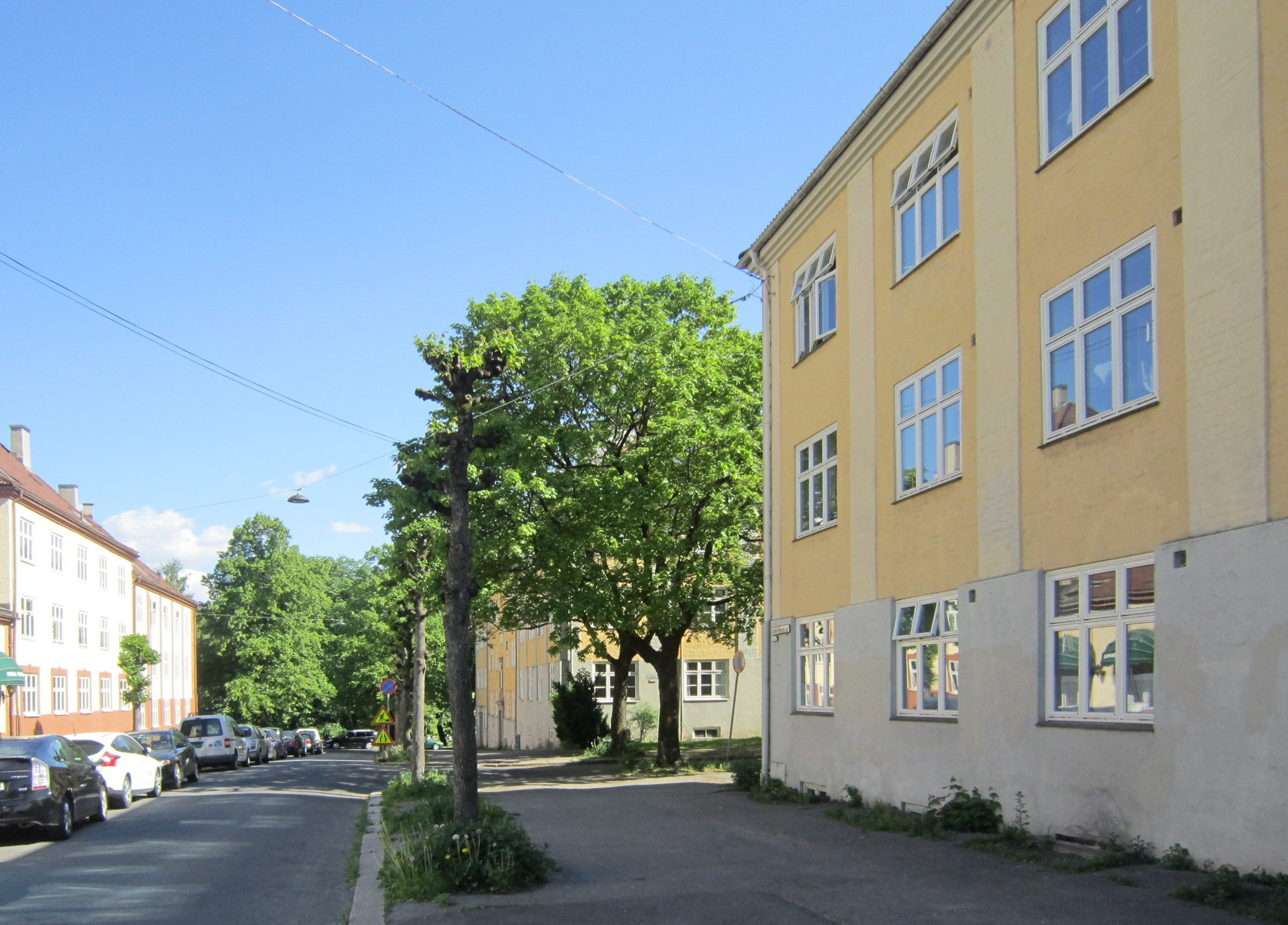 Agathe Grøndahls gate på Torshov i Oslo